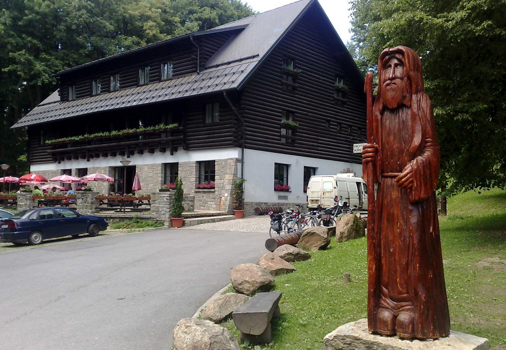 Hotel Křemešník